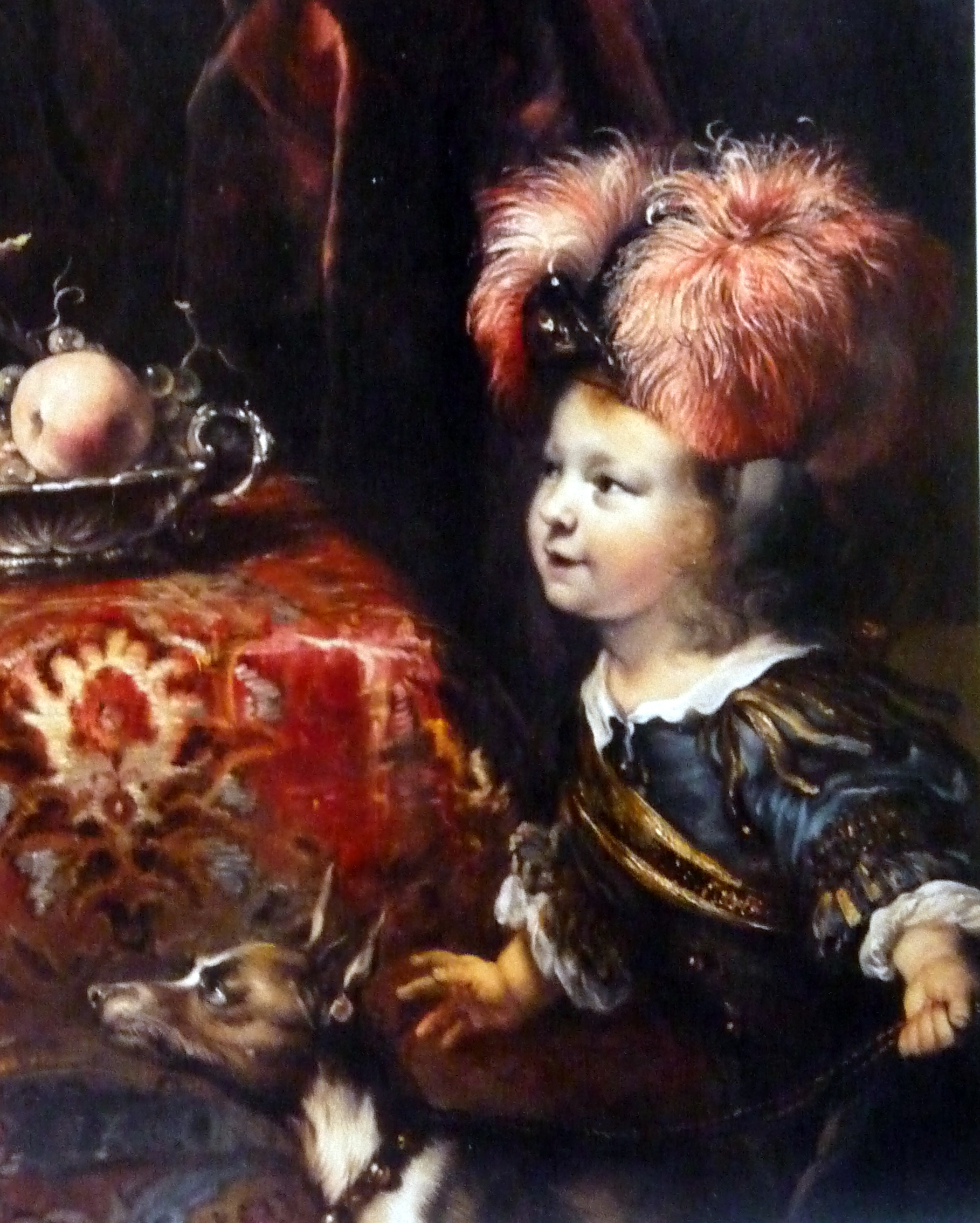 Auch Kopfbedeckungen von Kindern aus gehobenen Schichten schmückte man gerne mit Federbüschen.